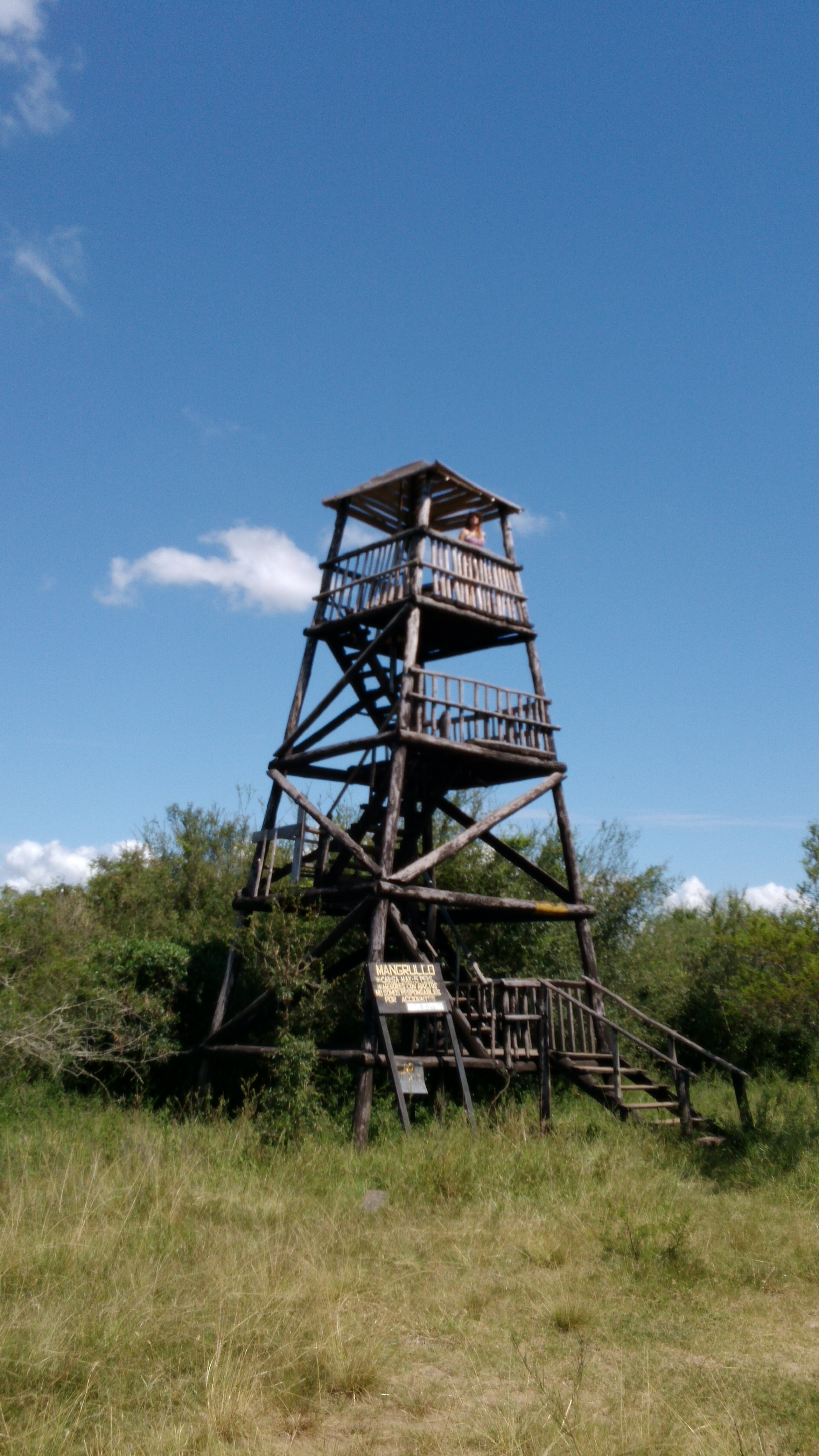 Mirador ubicado en el área protegida Rincón de Franquía. Desde él pueden observarse la costa de la provincia de Corrientes, Argentina sobre el río Uruguay, la Isla Brasileira, y los campos y monte del extremo noroeste del Uruguay.